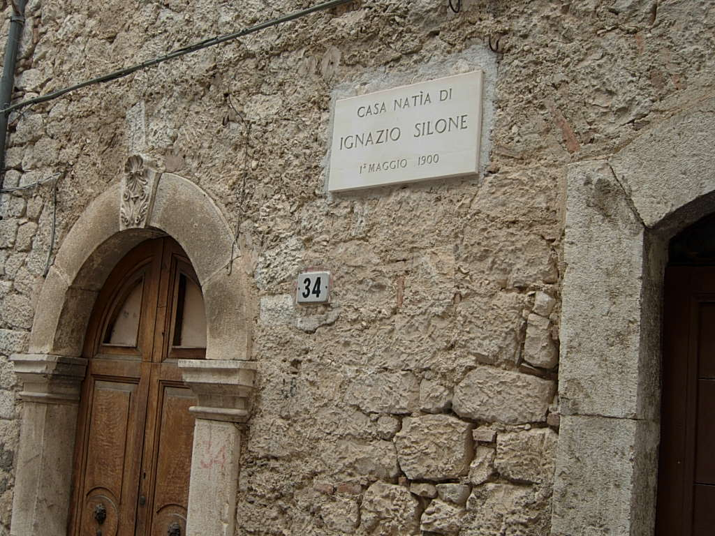 Casa natìa di Ignazio Silone Foto personale concessa in PD